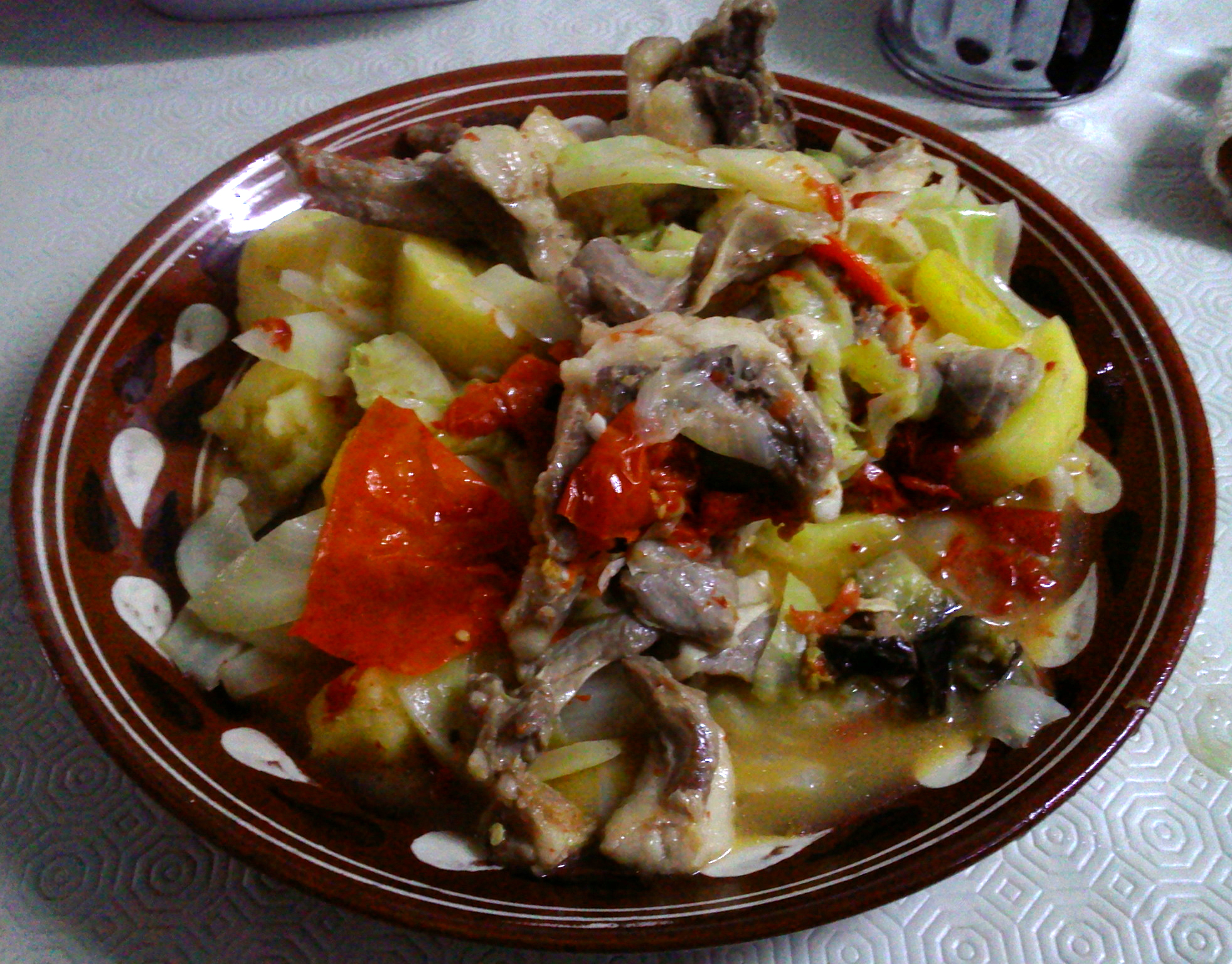 Дымдама